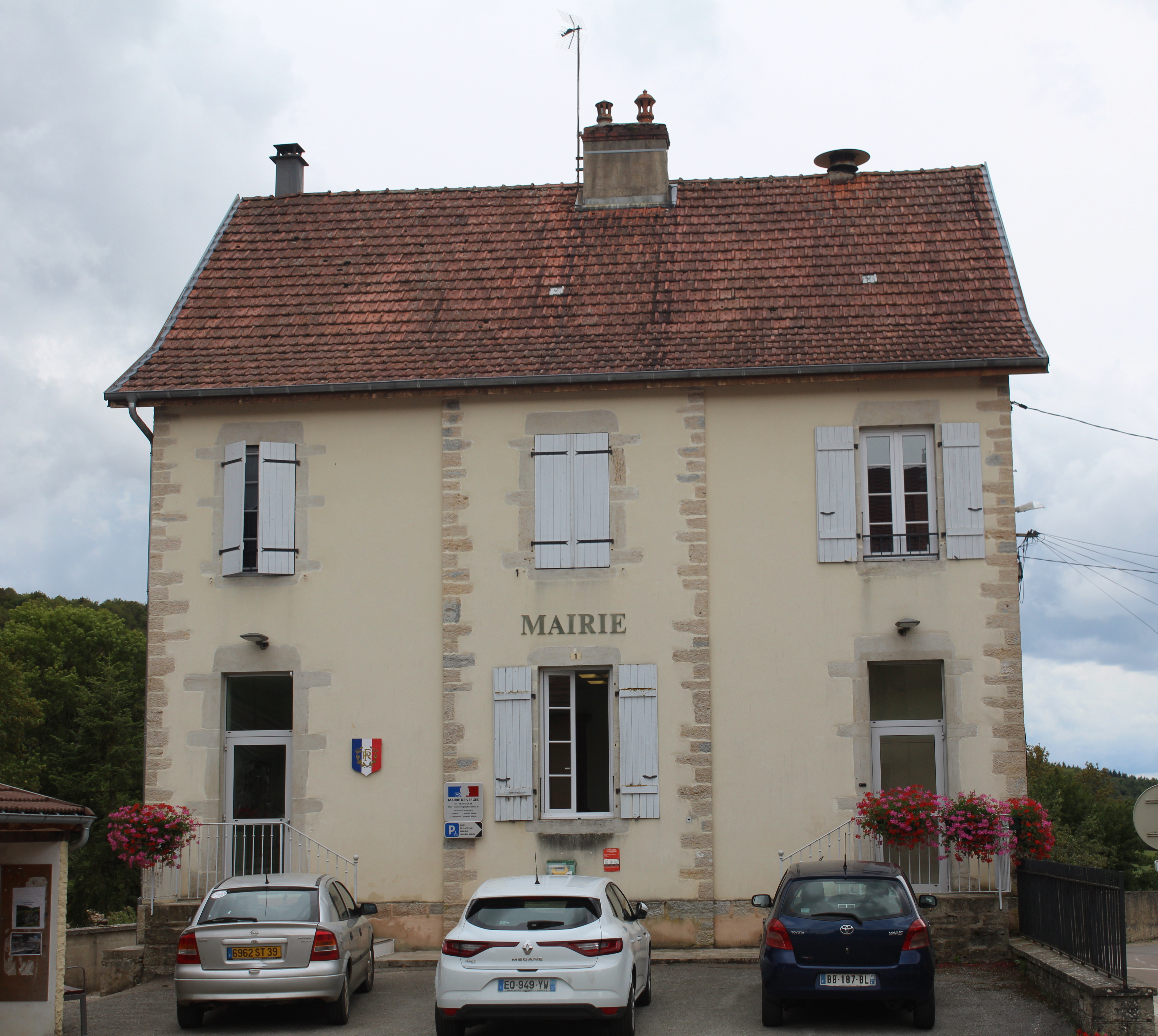 Mairie de Verges, Jura.